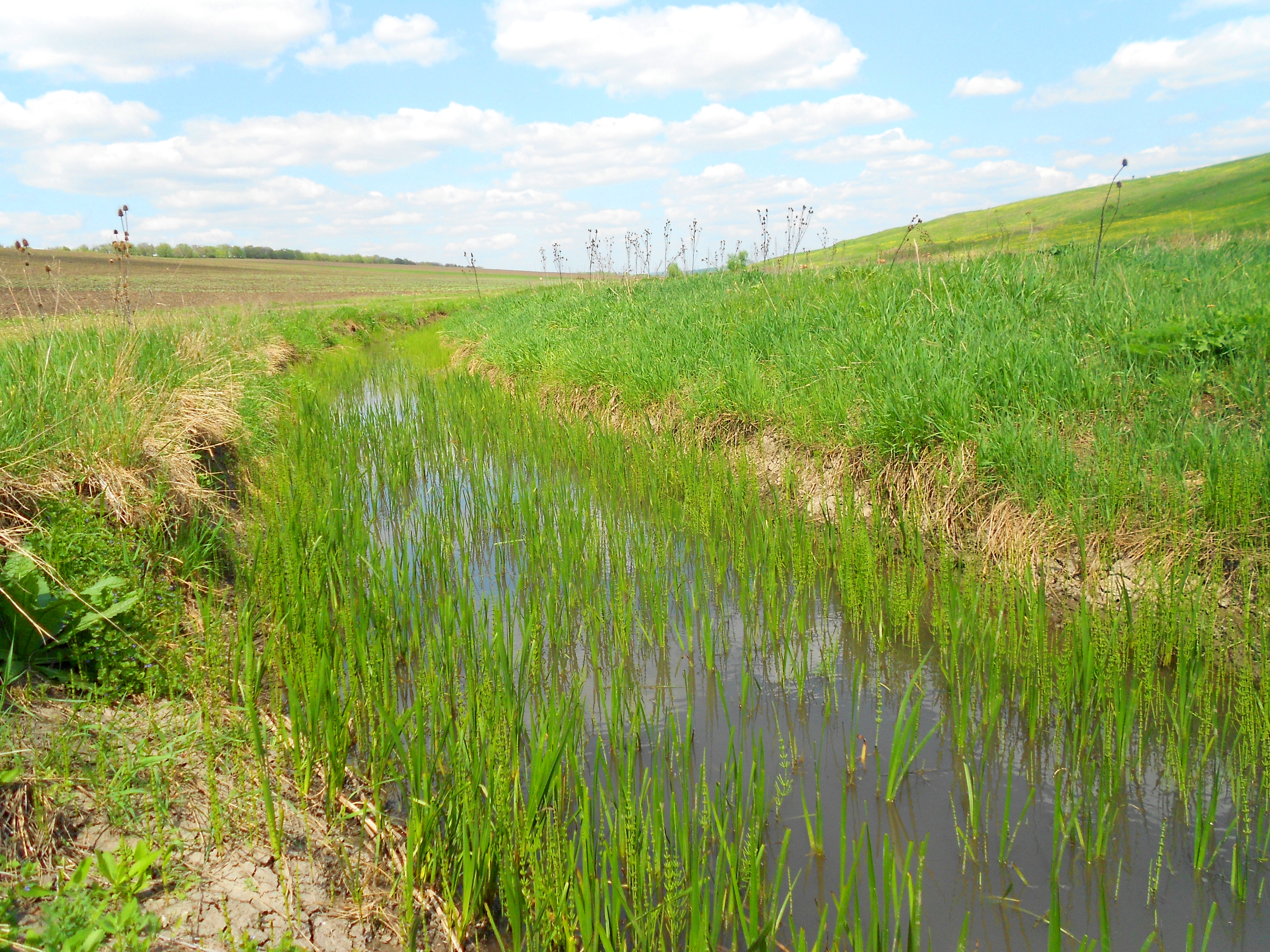 Răut în cursul superior, r. Dondușeni